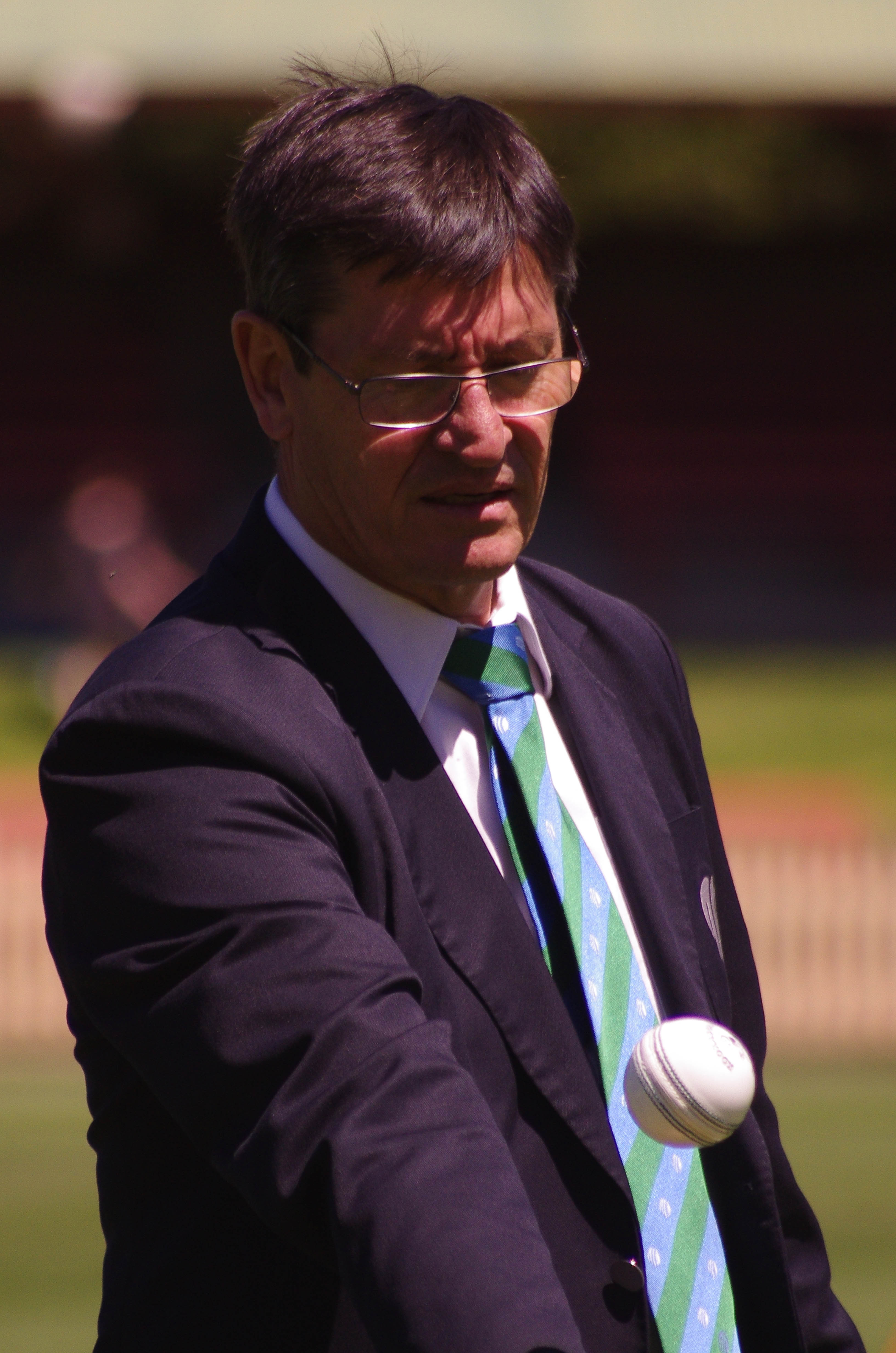 STEVE BERNARD